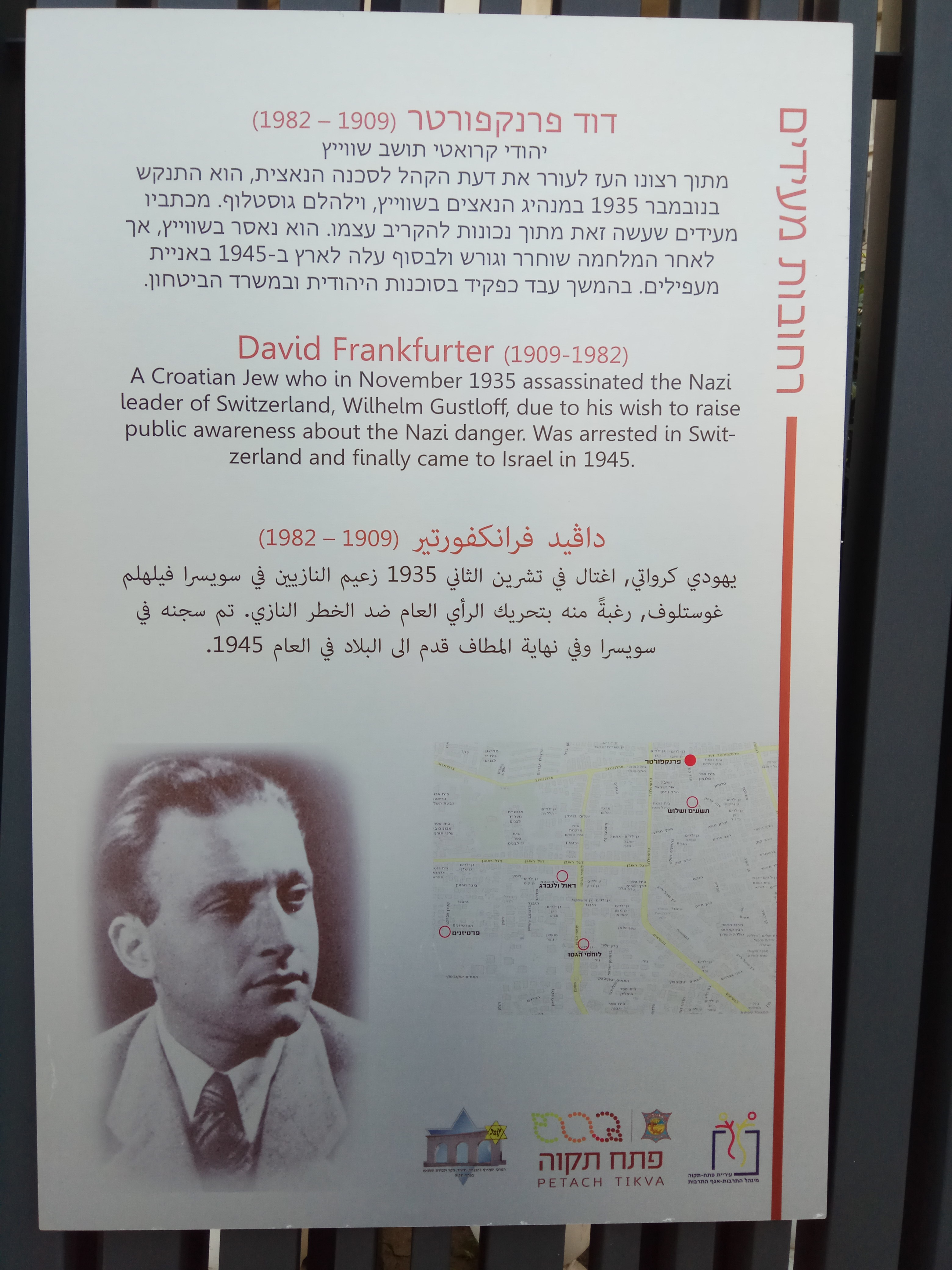 שלט הסבר על דוד פרנקפורטר ברחוב פרנקפורטר בפתח תקווה